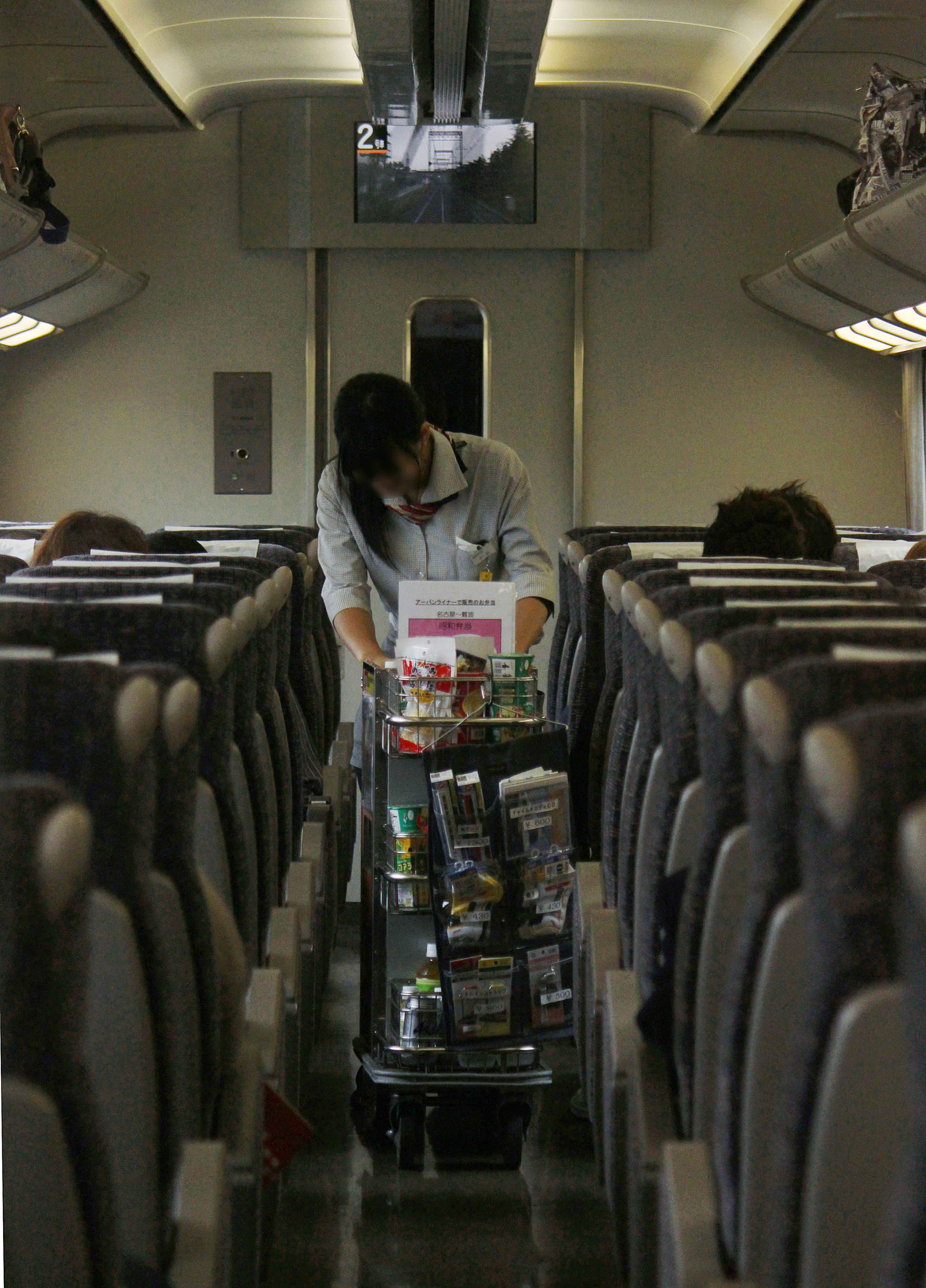 近鉄21000系車内における土日祝日限定の車内販売